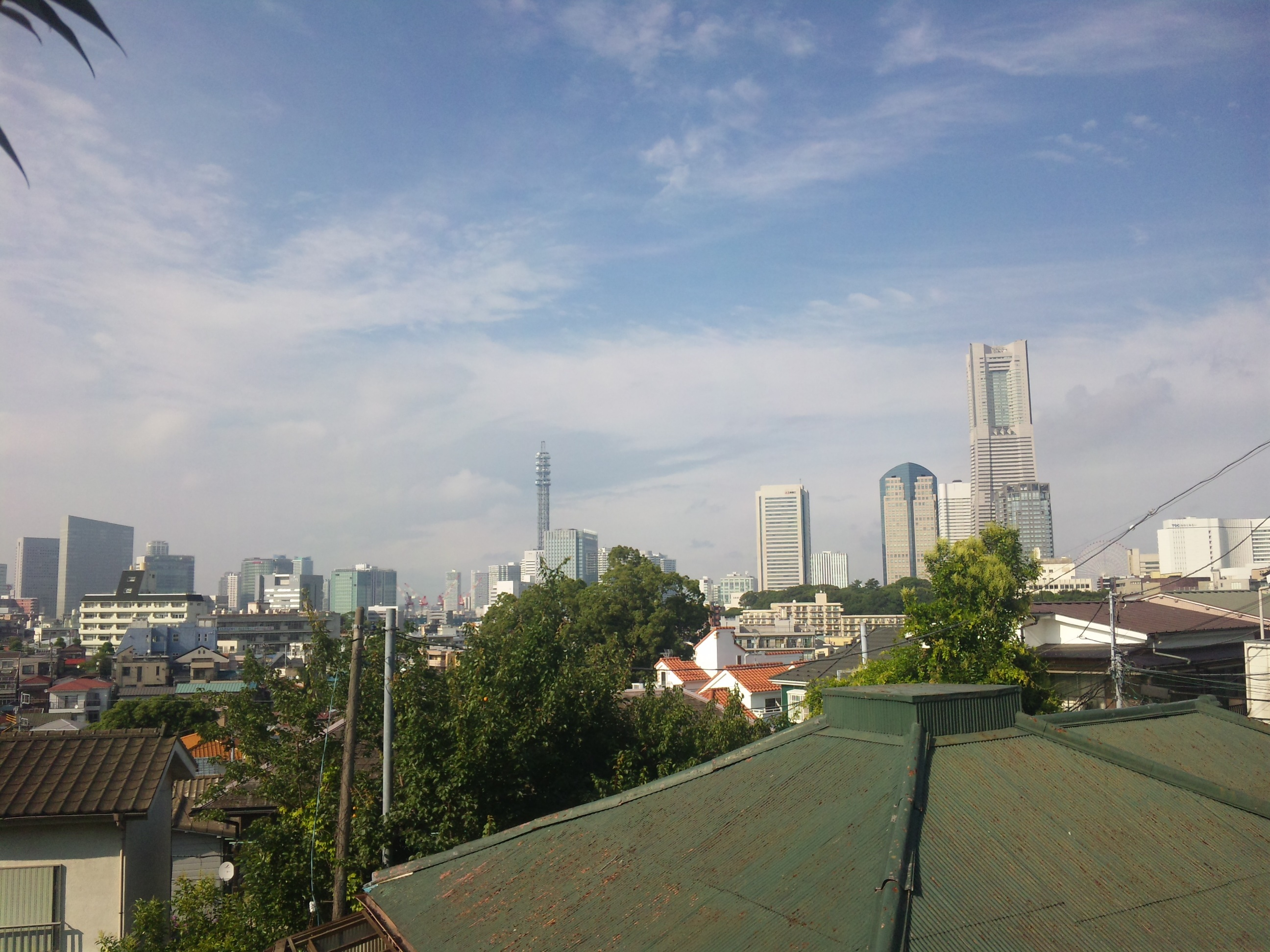 View of Minato Mirai from Tobe, Yokohama. Photographed using an SH-01B.